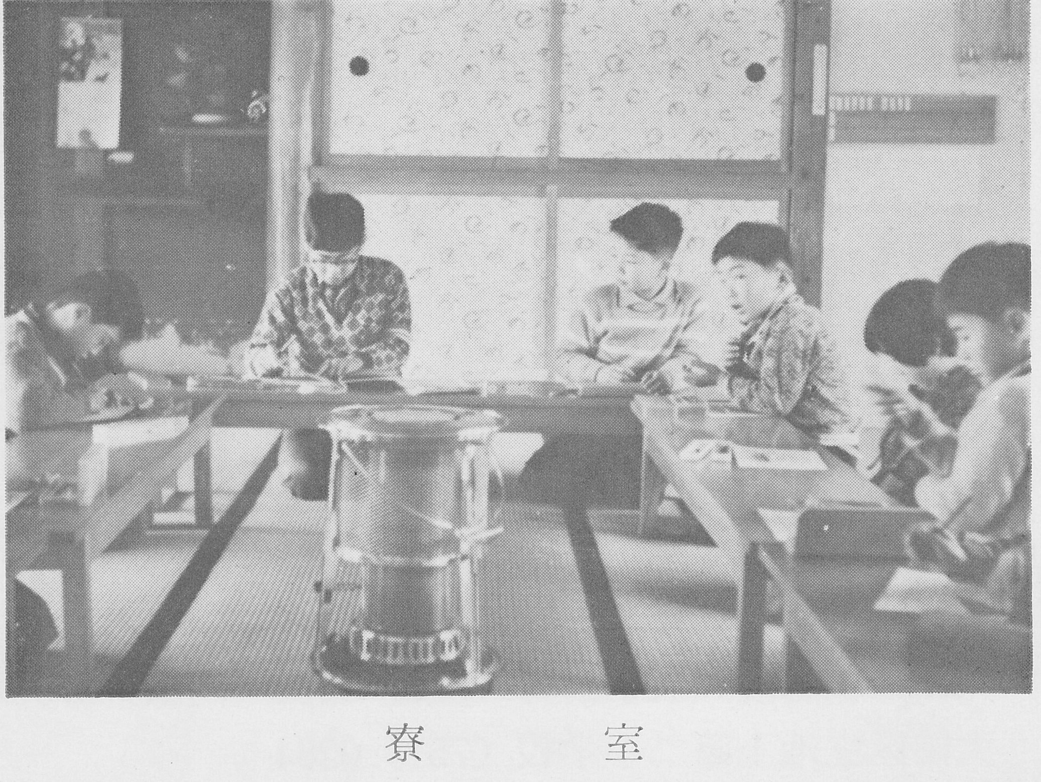 廃園となった養護施設に関する入園案内パンフレット抜粋